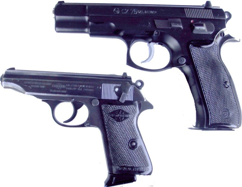 Größenvergleich Walther PP 7,65 mm und CZ75 9mm Parabellum (selbst aufgenommen, FDL)